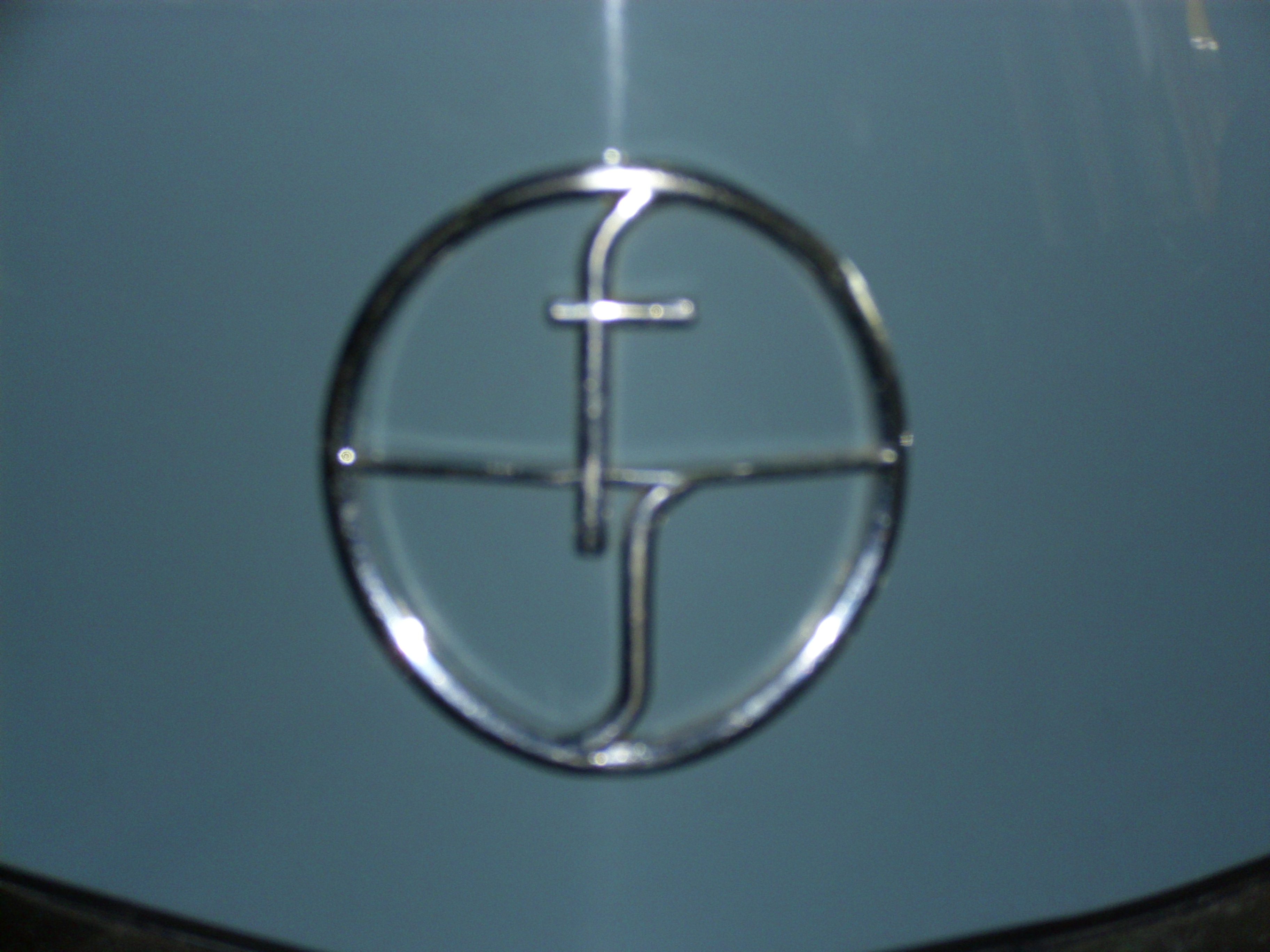 Emblem FSO an einem Warszawa